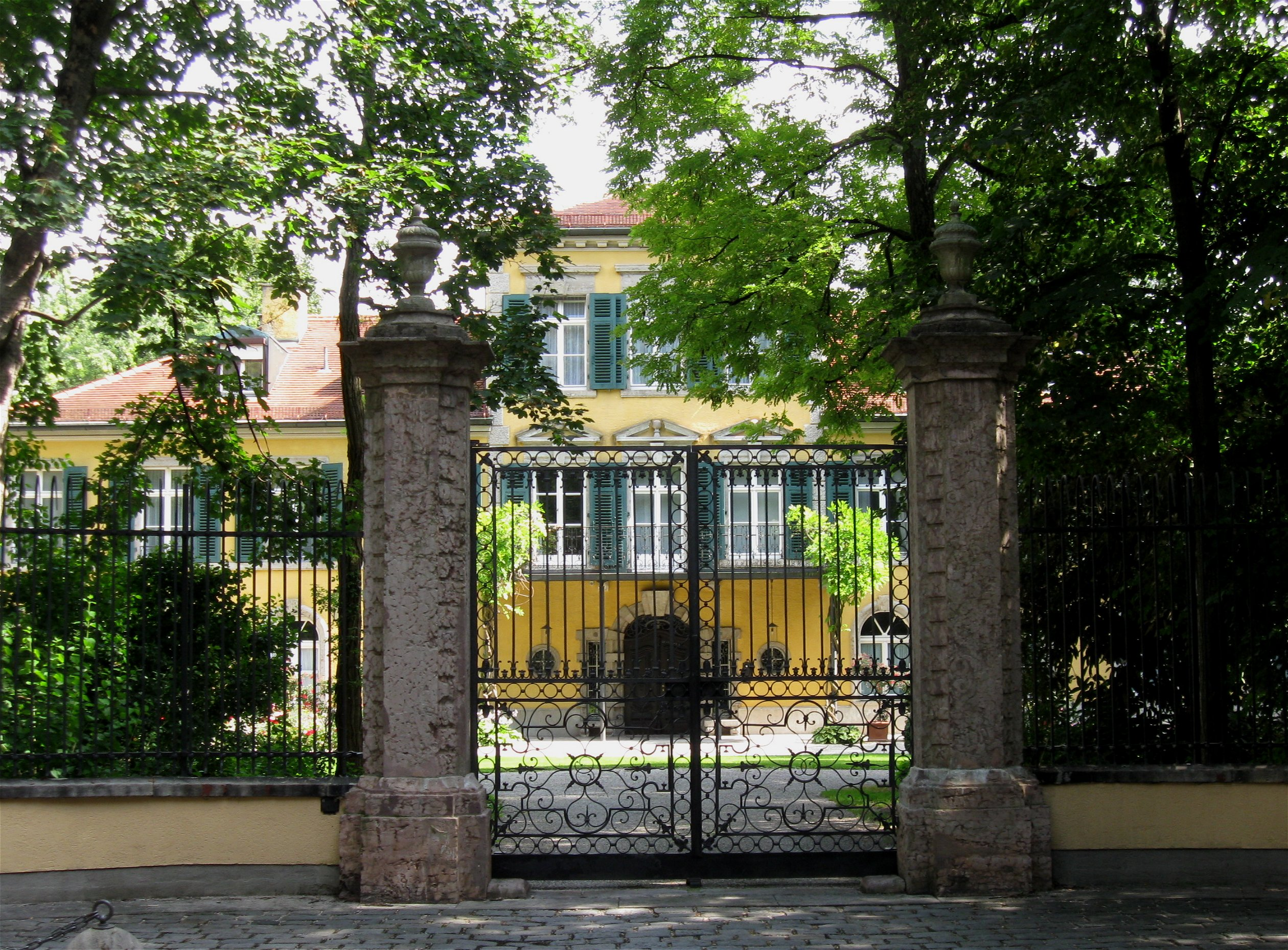 Werneckstraße 24; Schloss Suresnes, jetzt Teil der Katholischen Akademie, um 1715-18 vielleicht von Johann Baptist Gunezrainer, 1925 von Karl Bücklers umgebaut. Garten mit zahlreichen barocken und neubarocken Figuren. In der Westmauer Halbrondell mit Torpfeilern des späten 18. Jh. und Gitter. Im Norden Nebengebäude von 1925.